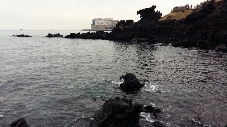 한국어 (조선): 용두암을 촬영